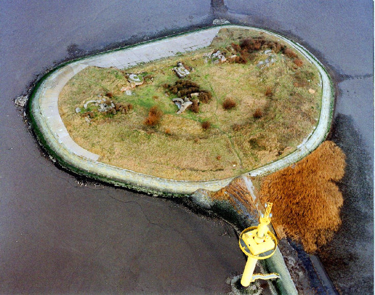 Luftbild Insel Langlütjen I